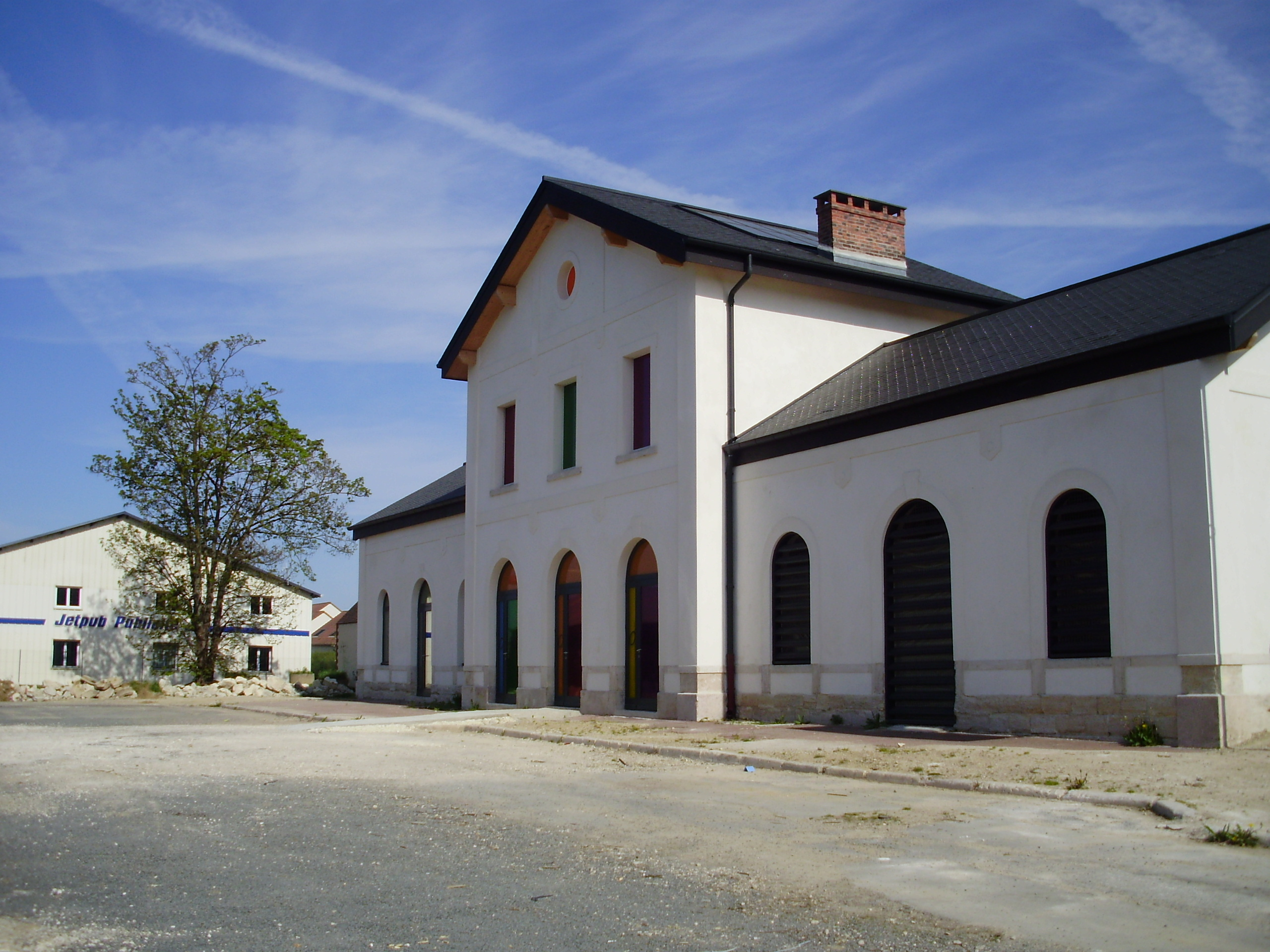 Gare de Brie-Comte-Robert, Seine-et-Marne, France (bâtiment voyageurs rénové, côté de l'ex-entrée des voyageurs)